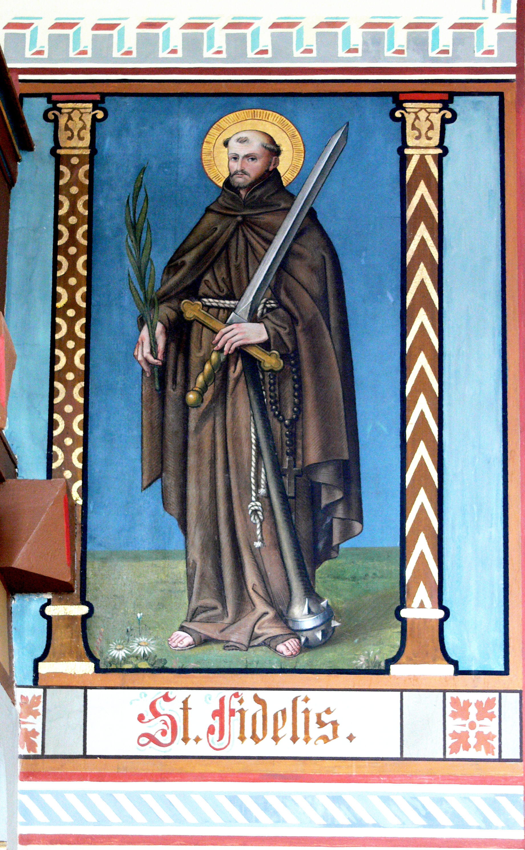 Filialkirche St. Venantius, Pfärrenbach, Gemeinde Horgenzell Wandmalerei im Kirchenschiff: Hl. Fidelis von Sigmaringen